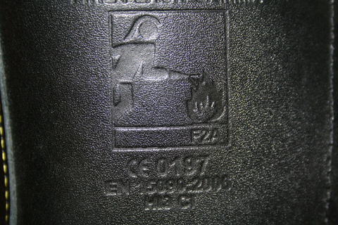 Piktogramm auf einem Feuerwehrstiefel der Berufsfeuerwehr Augsburg